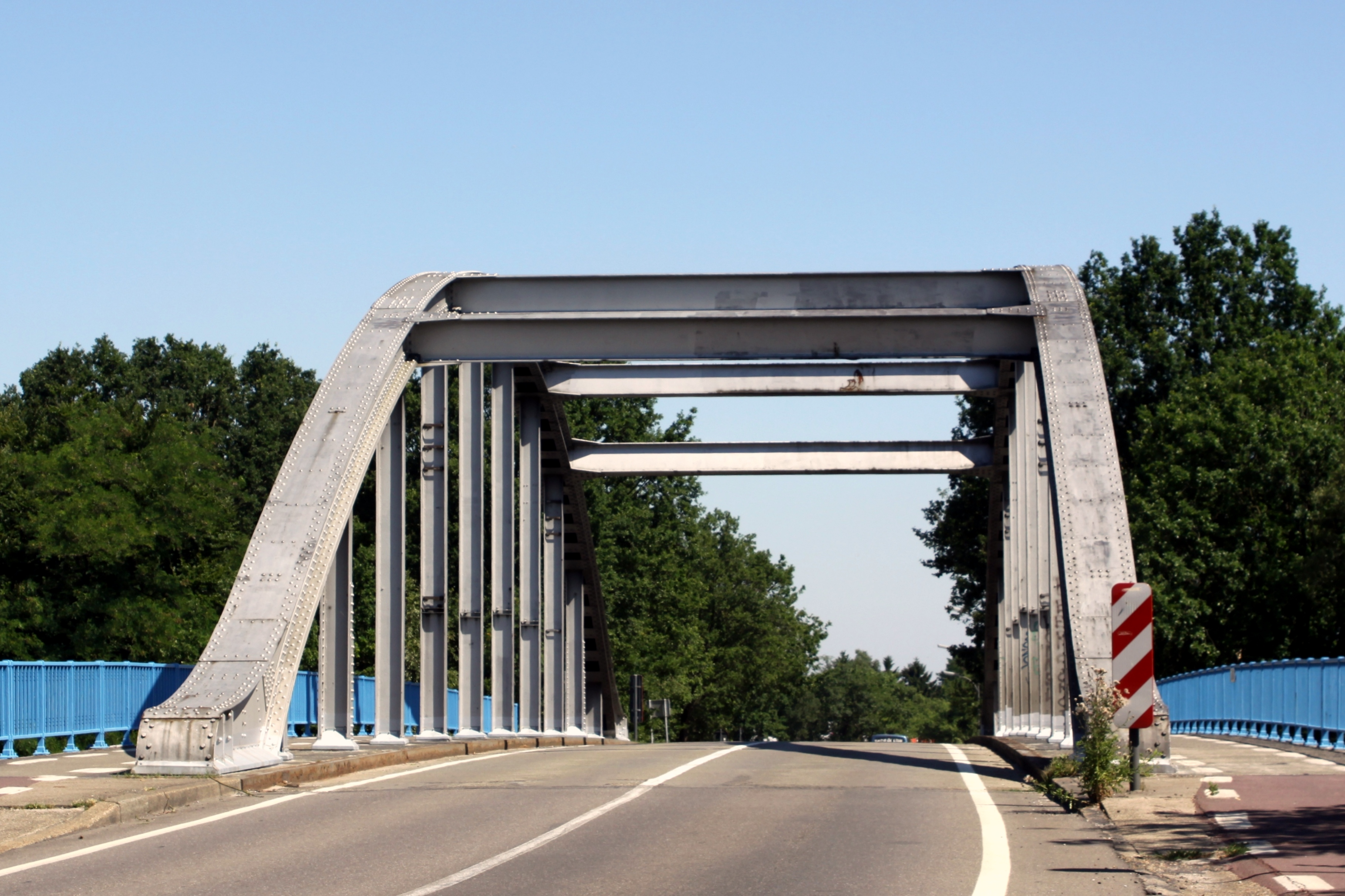 D'Joe's Bridge am Juli 2010